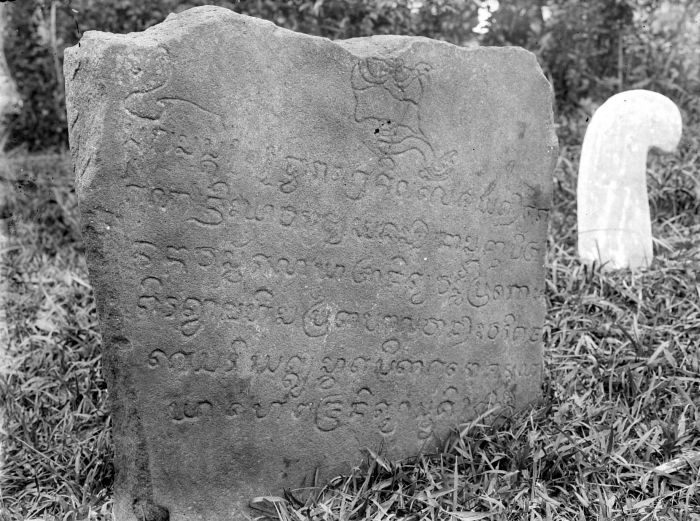 Negatief. Beschreven steen